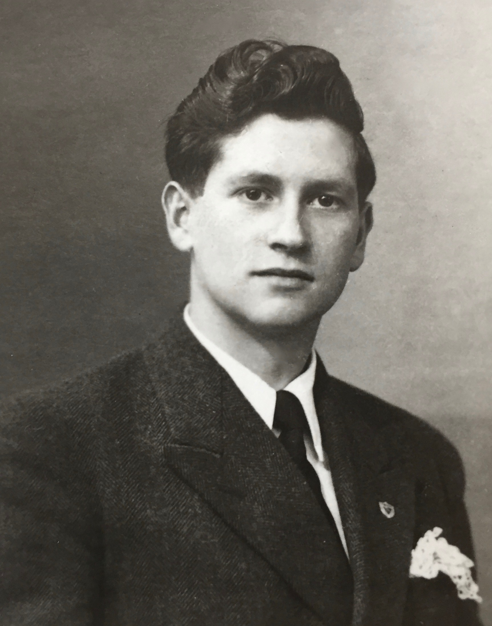 Raymond Gourlin